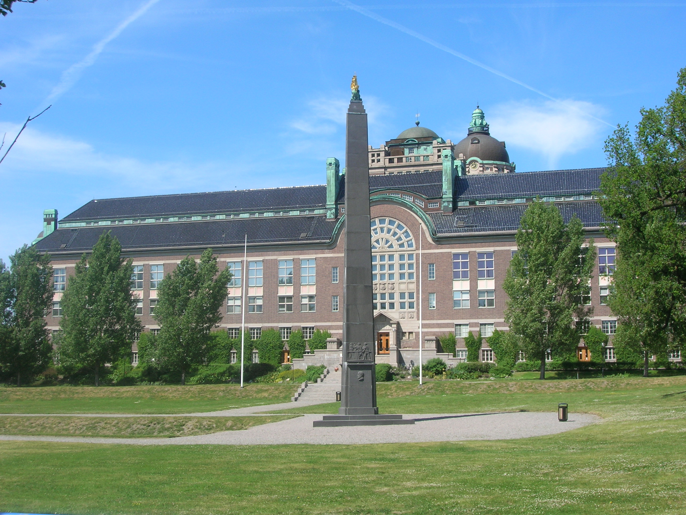 Naturhistoriska Riksmuseet sett söderifrån, Stockholm, Sweden.